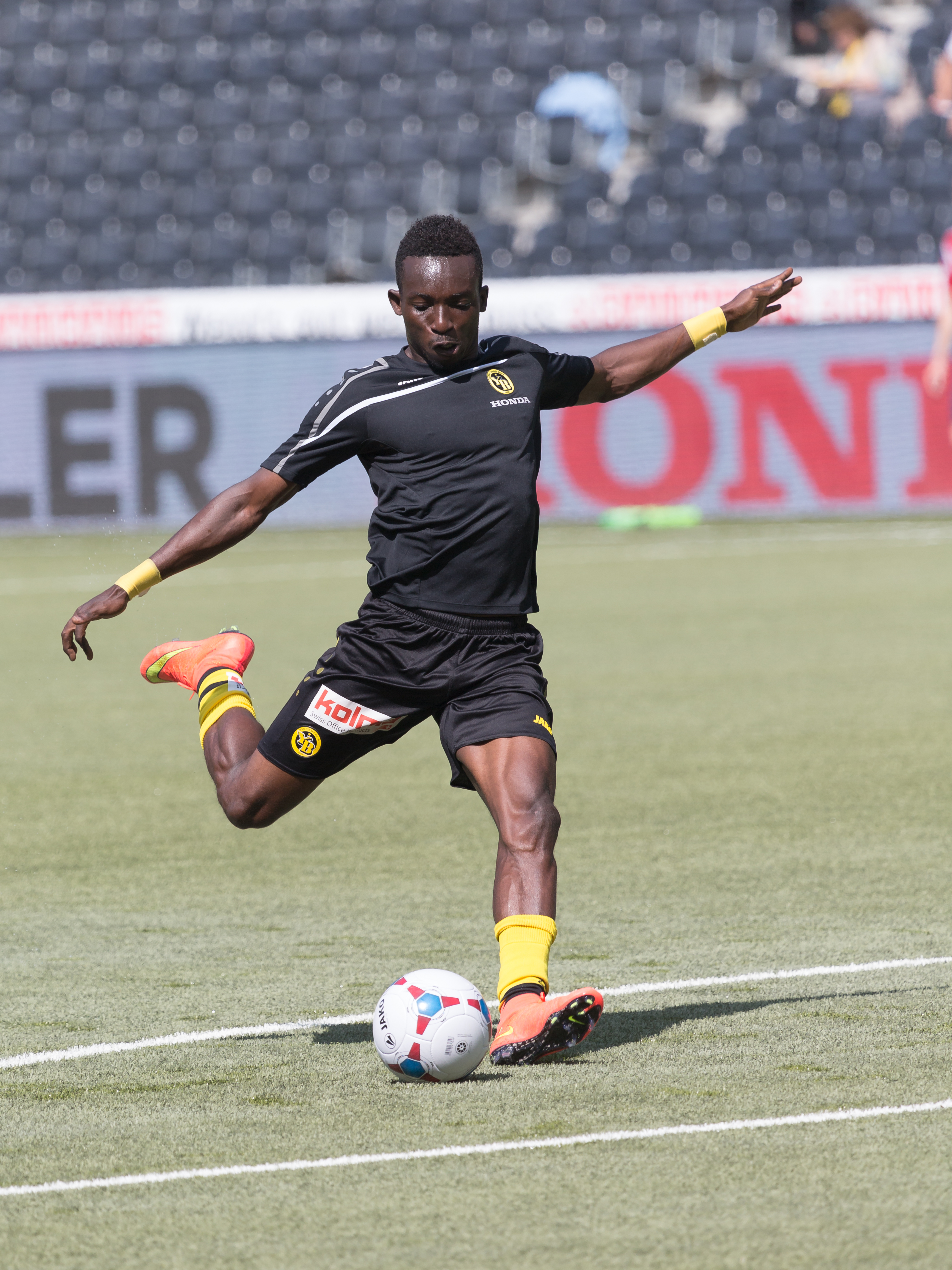 Samuel Afum beim Spiel des BSC Young Boys gegen den FC Luzern